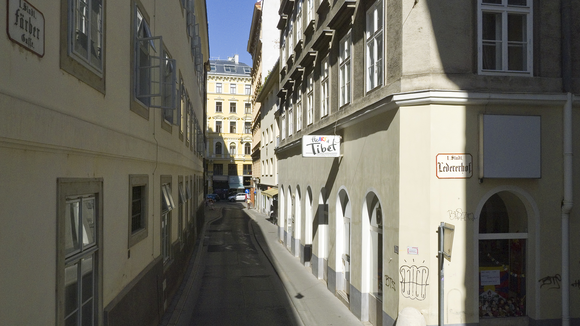 Färbergasse in Wien 1 bei Nr. 4 Richtung Nordosten